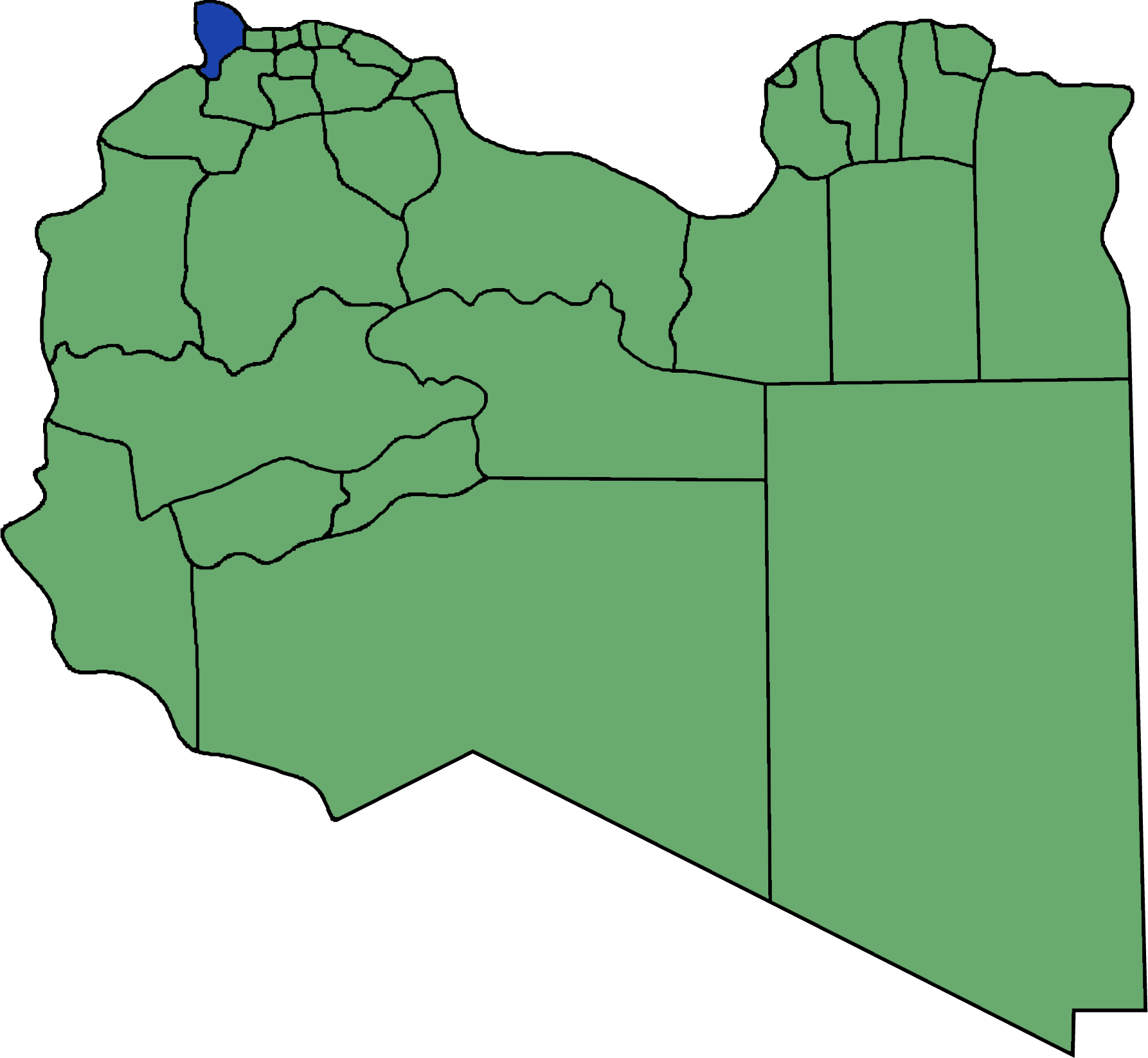 Die neuen Gemeinden (Munizipien) in Libyen. An Nuqat al Khams hervorgehoben.